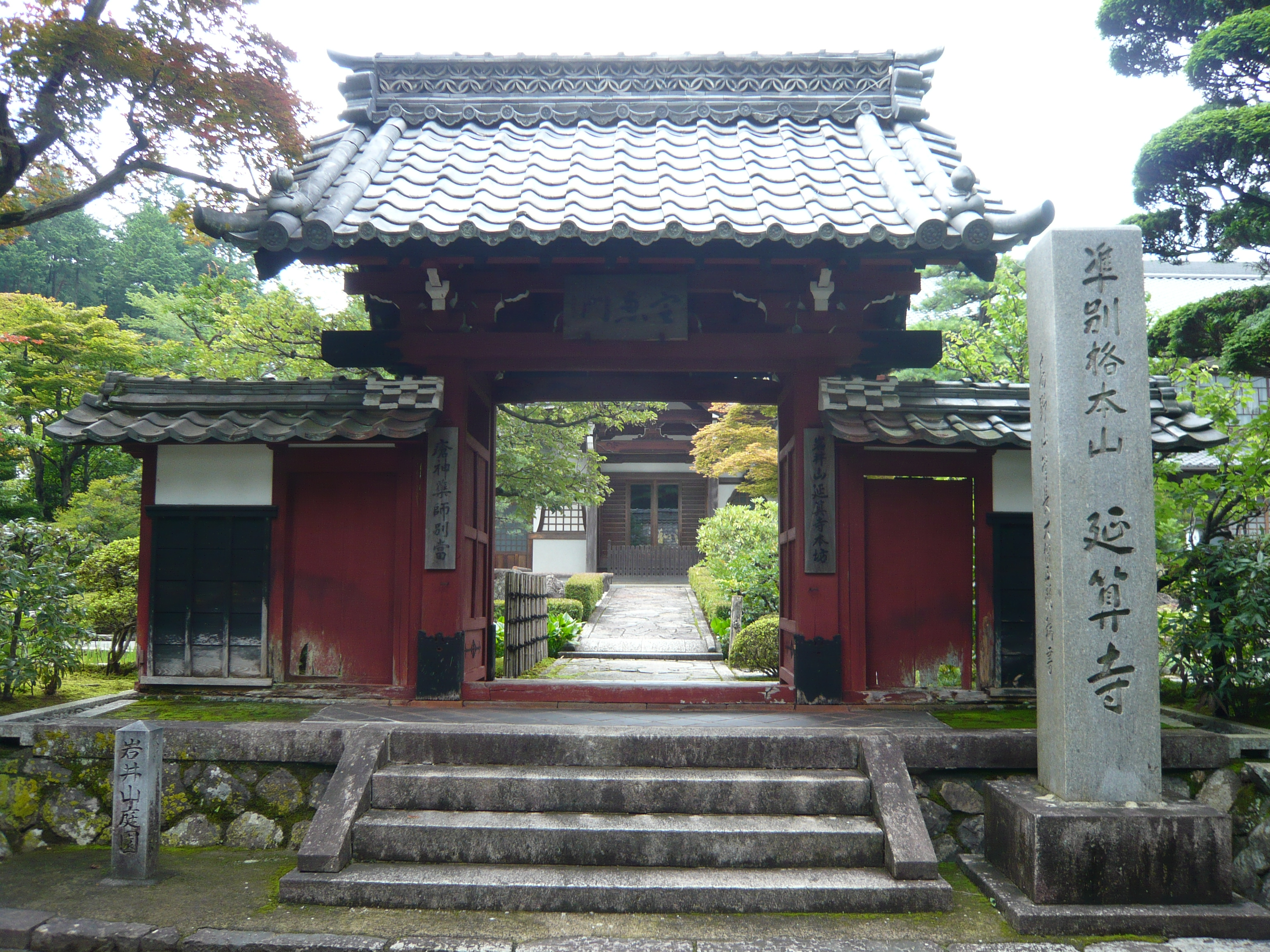 延算寺（岩井山かさ神）、本坊